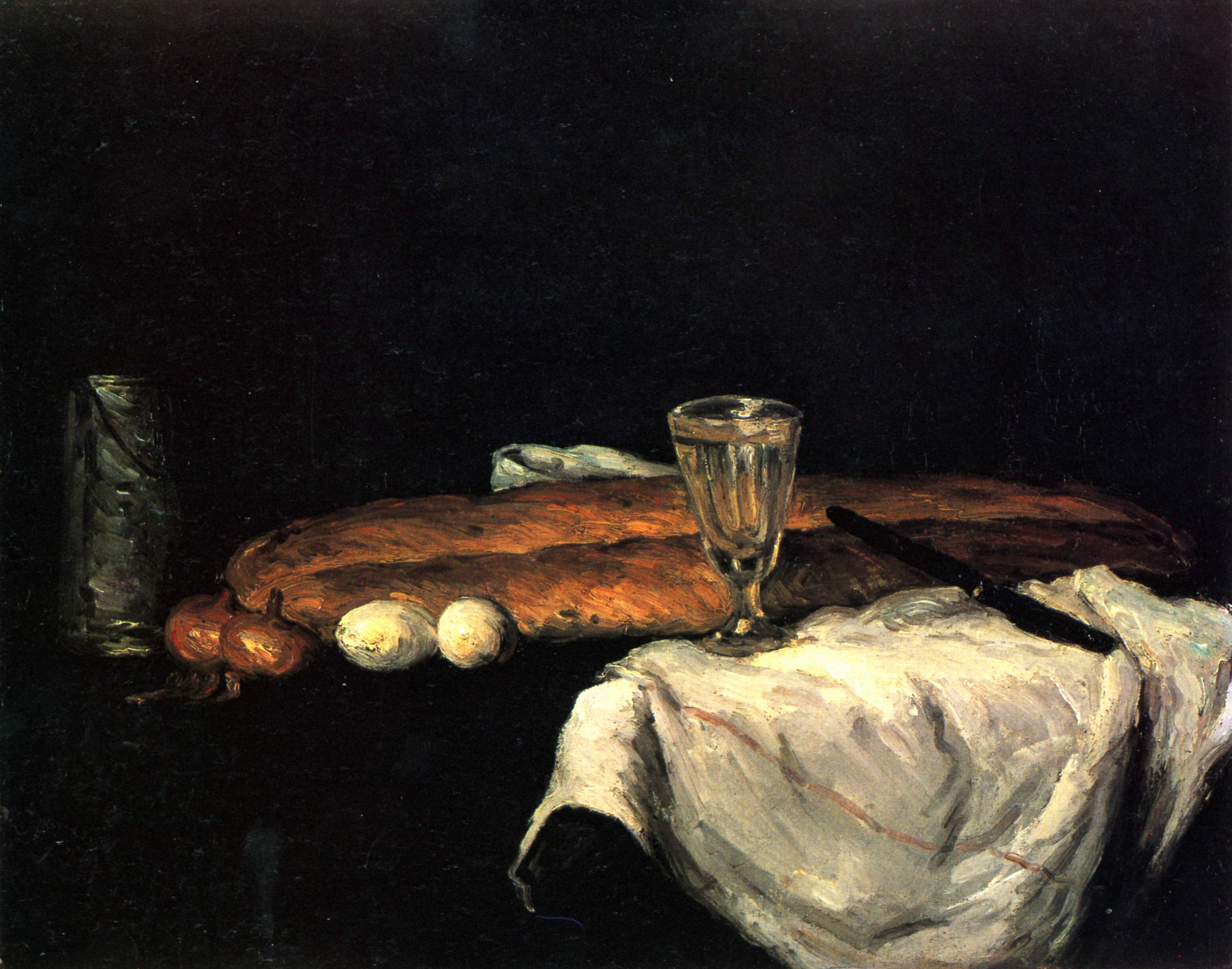 Stilleben mit Brot und Eiern